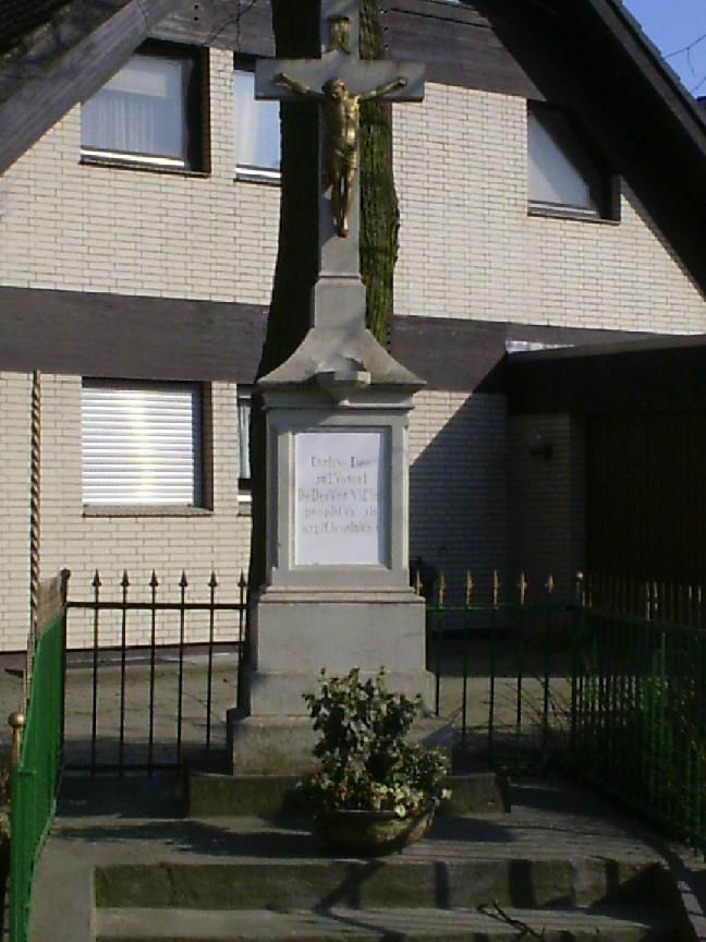 Wegekreuz Heyers als Flurdenkmal aus dem Jahr 1886 im Erkelenzer Ortsteil Borschemich